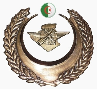 Insigne du commandement des forces de défense aérienne du territoire